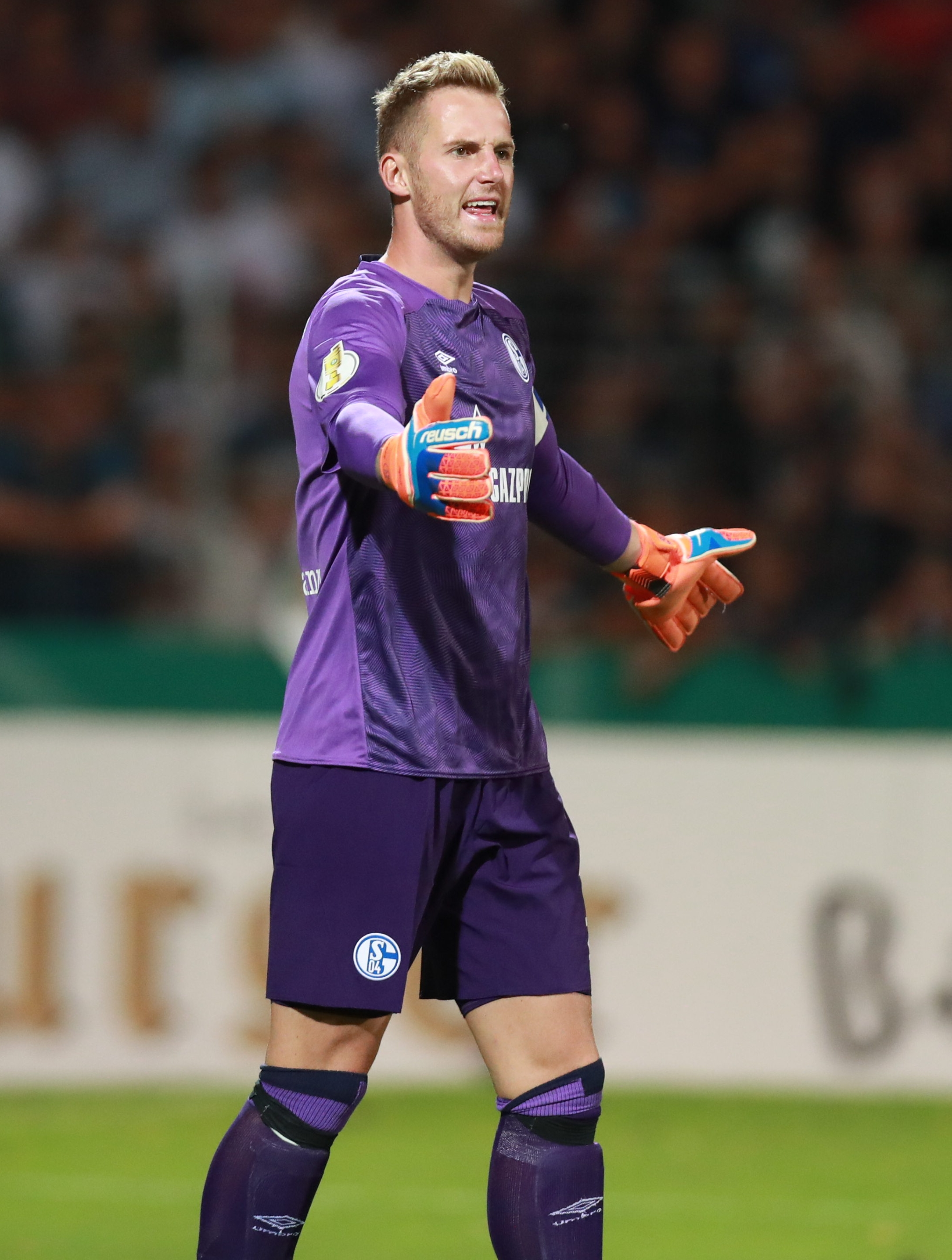 DFB-Pokal 2018/19, 1. Hauptrunde: 1. FC Schweinfurt 05 gegen FC Schalke 04 0:2 (0:1): Ralf Fährmann